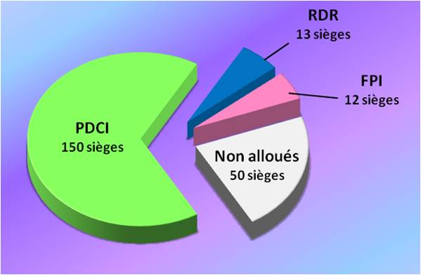 répartition des sièges à l'Assemblée nationale (Côte d'Ivoire) pour la 9ème législature (1995-2000)